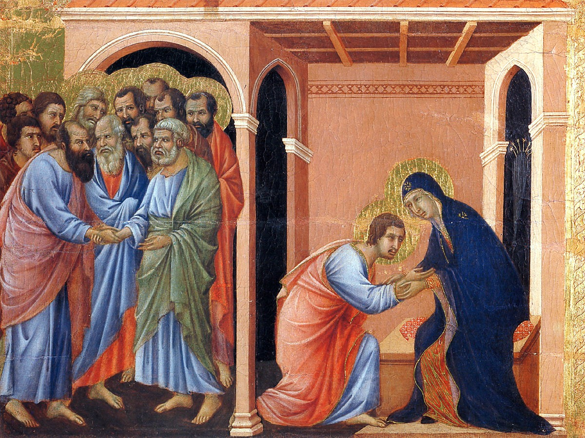 Duccio_Maesta_detail1.jpg